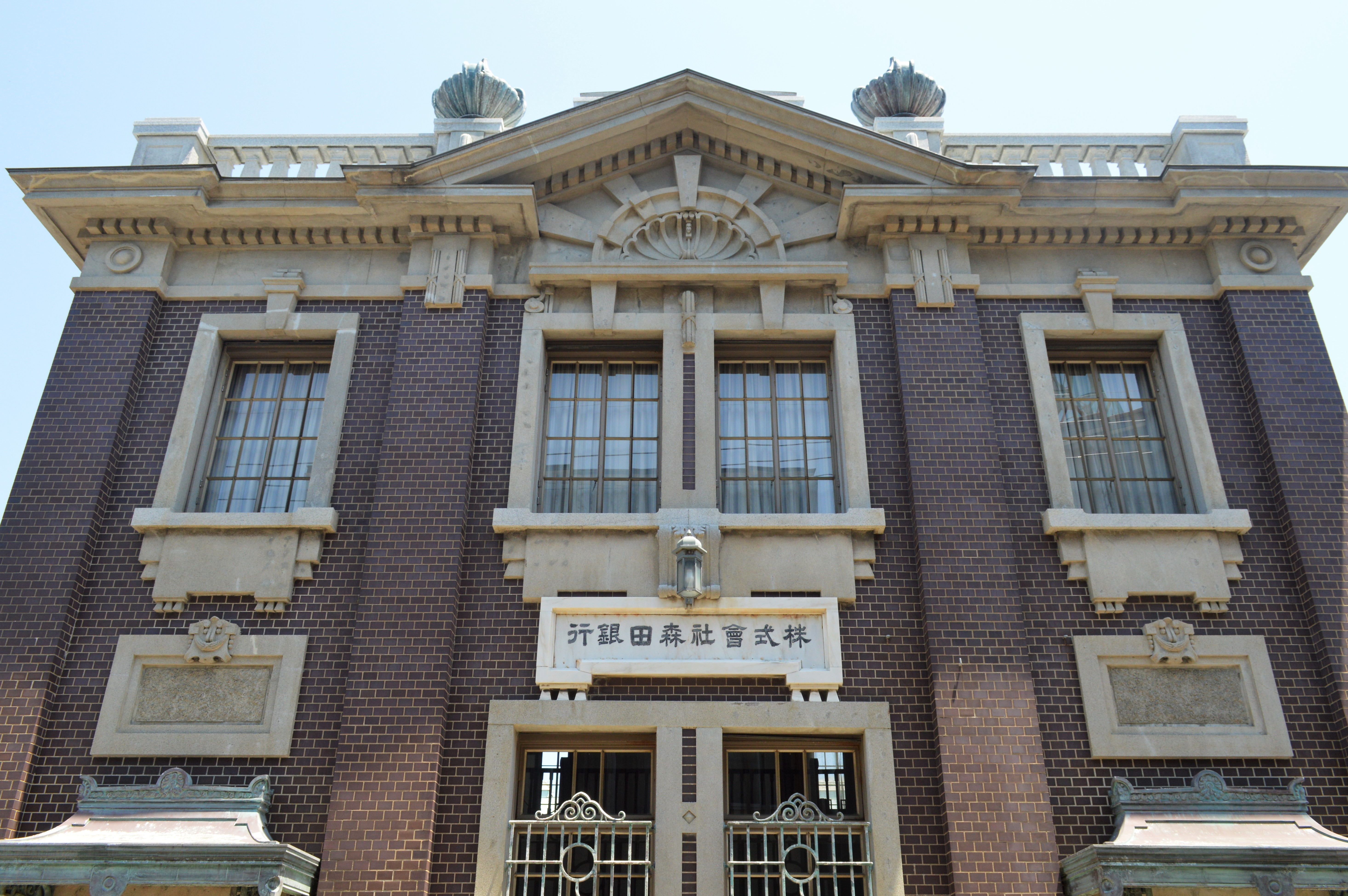 福井県坂井市三国町にある「旧森田銀行本店」。登録有形文化財。